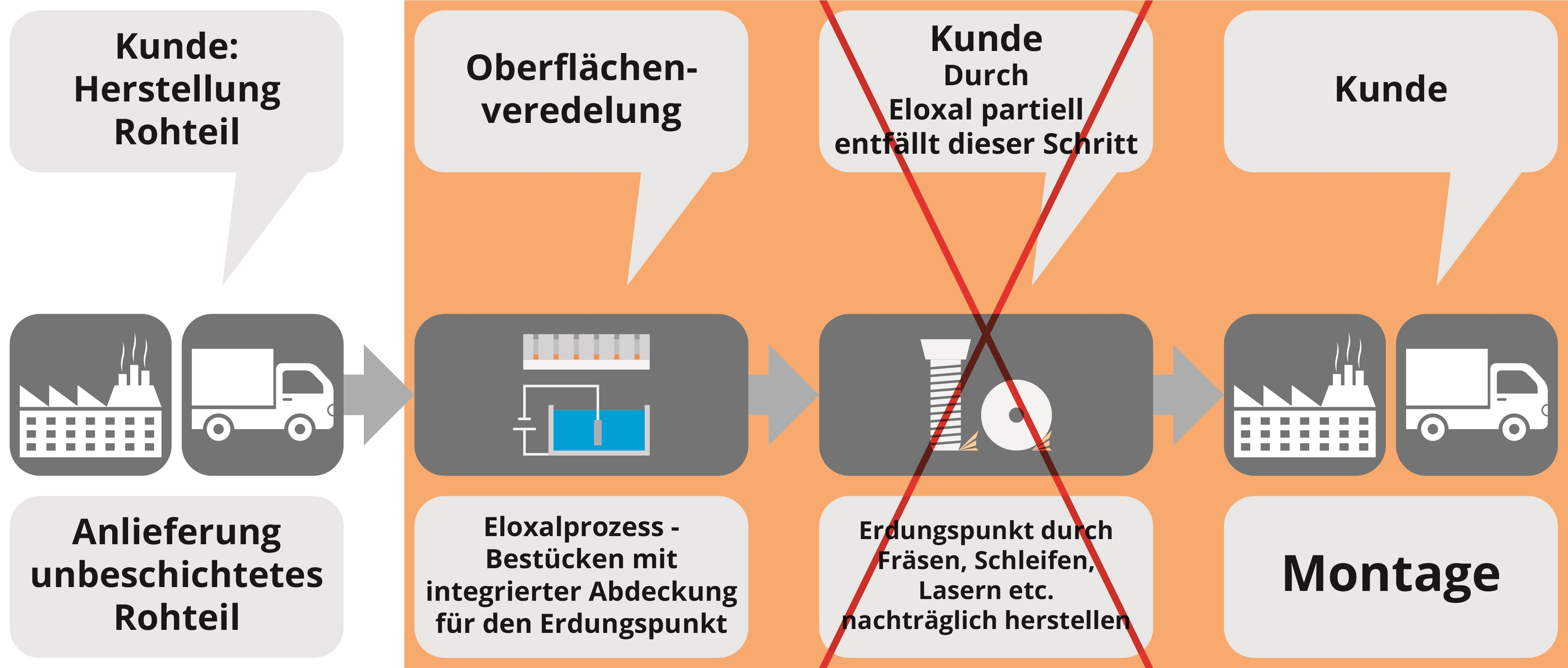 Vergleich der erforderlichen Verfahrensschritte bei der bisher üblichen Technik und Eloxal partiell plus